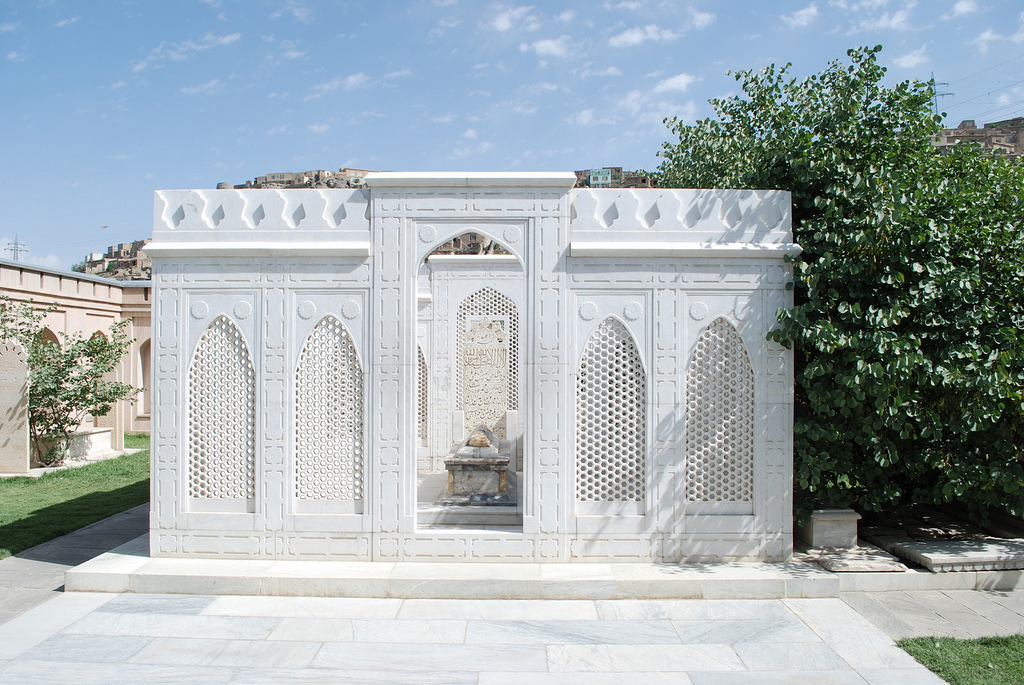 Babur's Grave